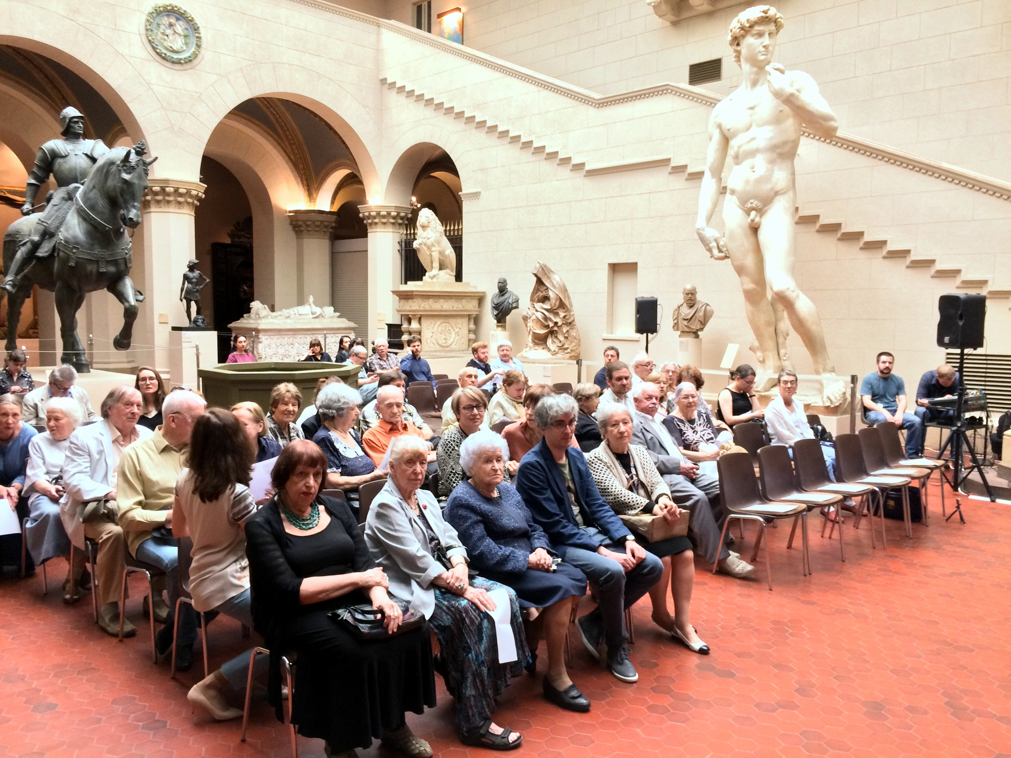 В понедельник, 14 мая 2018 года, в Государственном музее изобразительных искусств имени А. С. Пушкина (ГМИИ) в зале «Итальянский дворик» состоялась расширенное заседание Клуба наследников и коллекционеров по теме «Из истории изучения отечественного искусства 1920-1950-х годов и музейного комплектования». Встреча-конференция была приурочена к юбилейным мероприятиям памяти искусствоведов и историков искусств Ольги Осиповны Ройтенберг и Веры Николаевны Шалабаевой, автора и составителя известной в художественных кругах книги о советских довоенных художниках: «Неужели кто-то вспомнил, что мы были… : из истории художественной жизни, 1925-1935» (2004, 2008)[1].